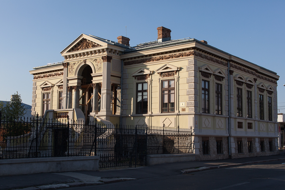 Casa Ana și Marinache Popescu, azi DJCCPCN